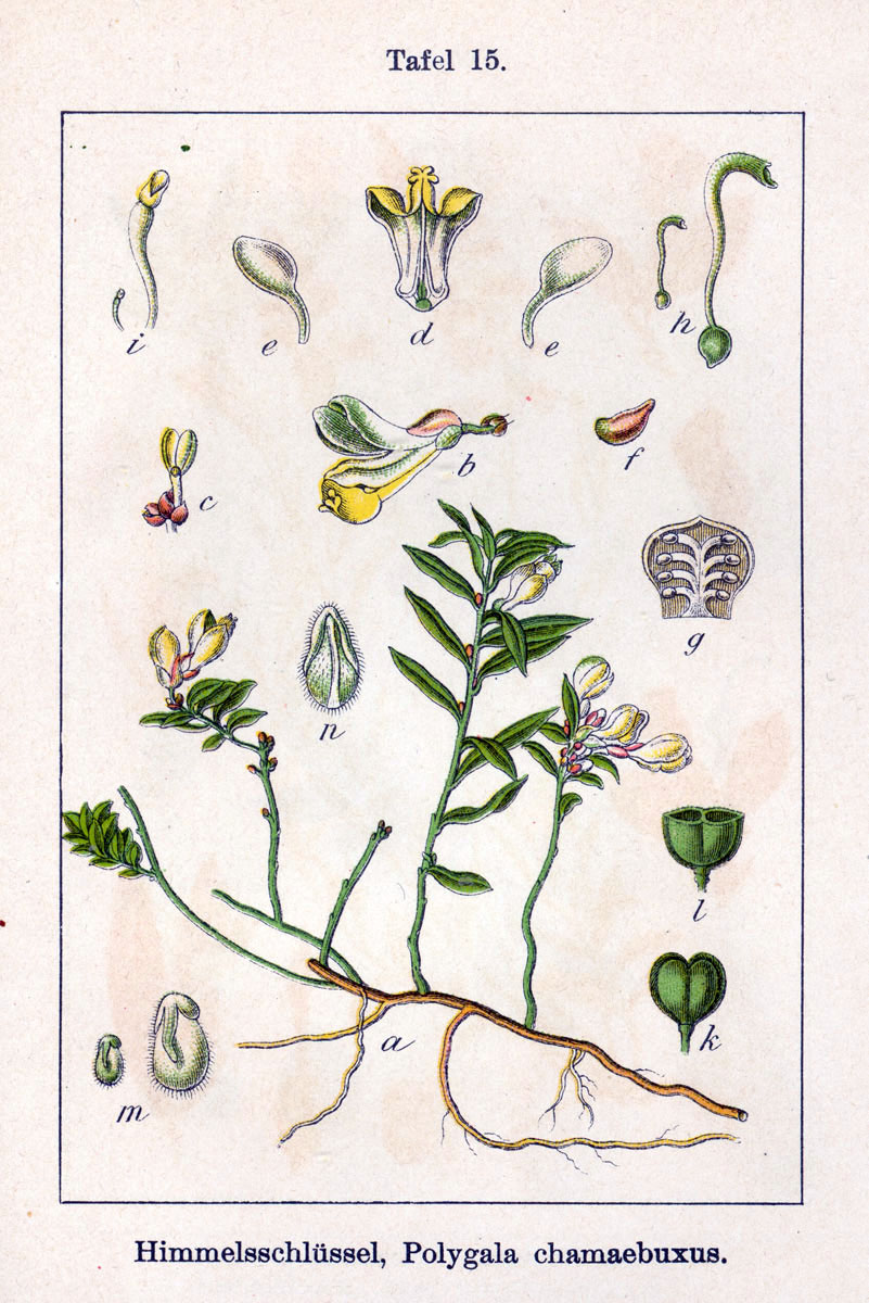 Polygala chamaebuxus L. Original Description Himmelsschlüssel, Polygala chamaebuxus